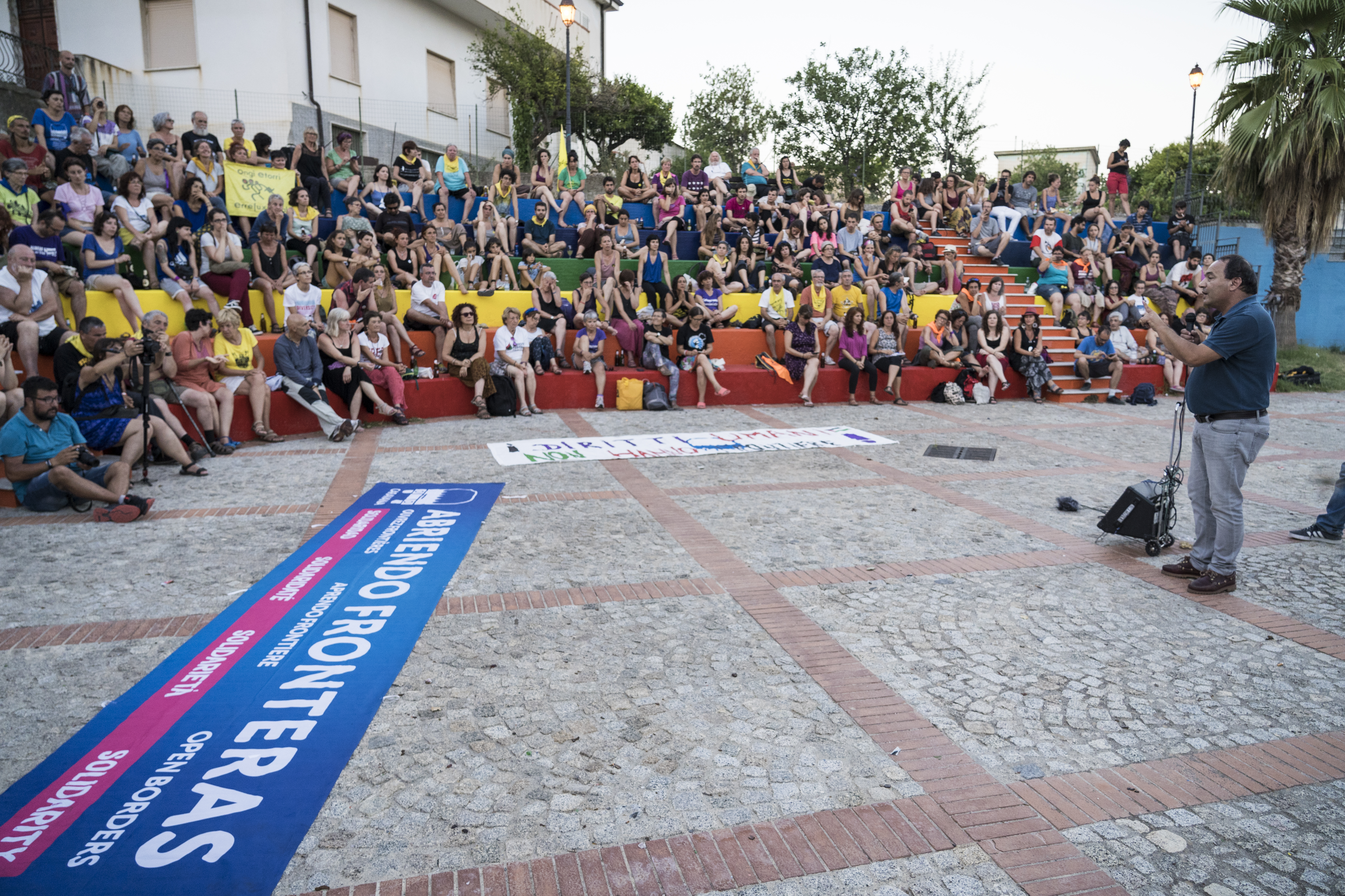 Mugak Zabalduz Karabana Riace herrian duen harrera.